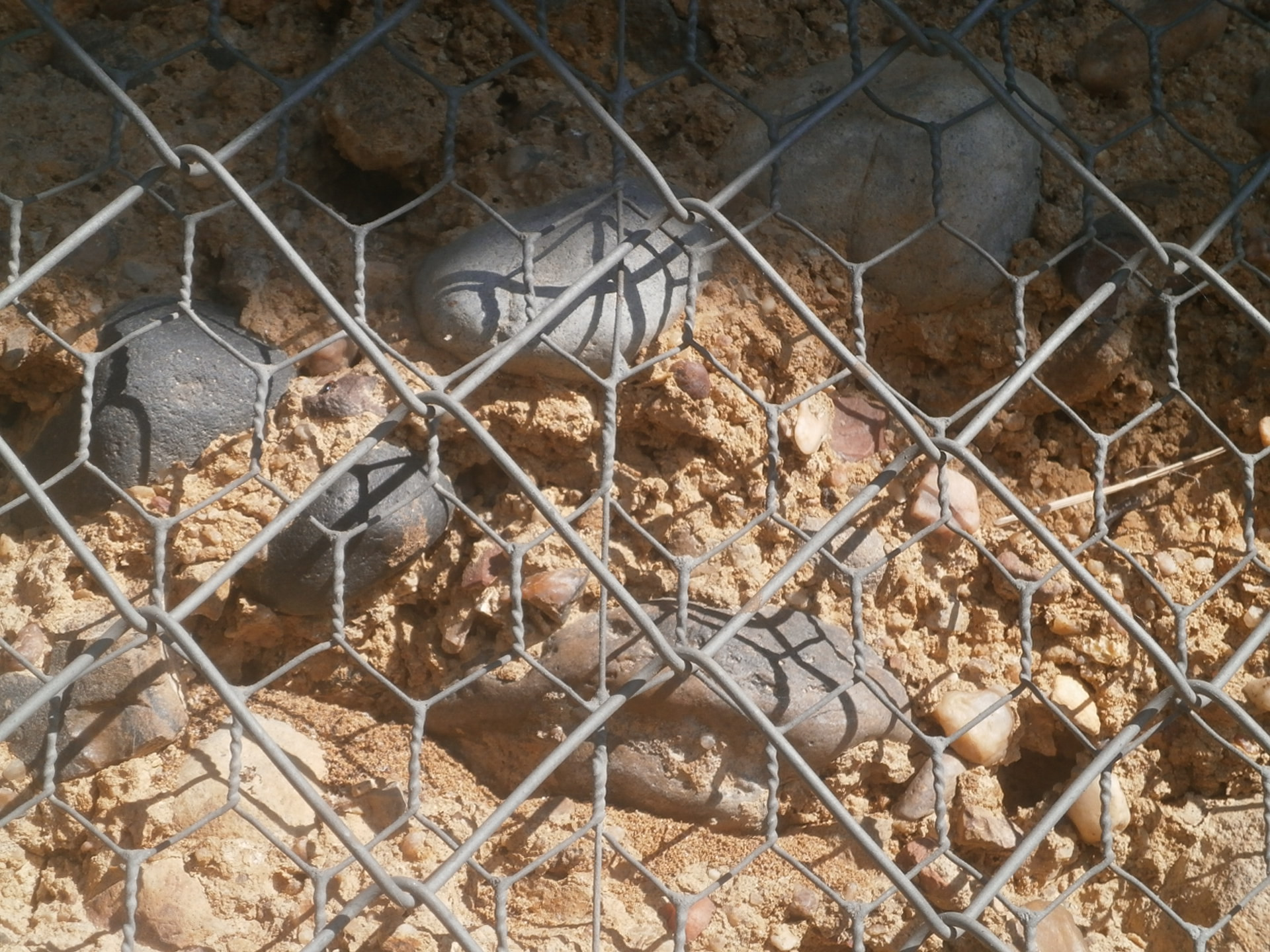 Détail de la coupe du rempart oriental de l'oppidum